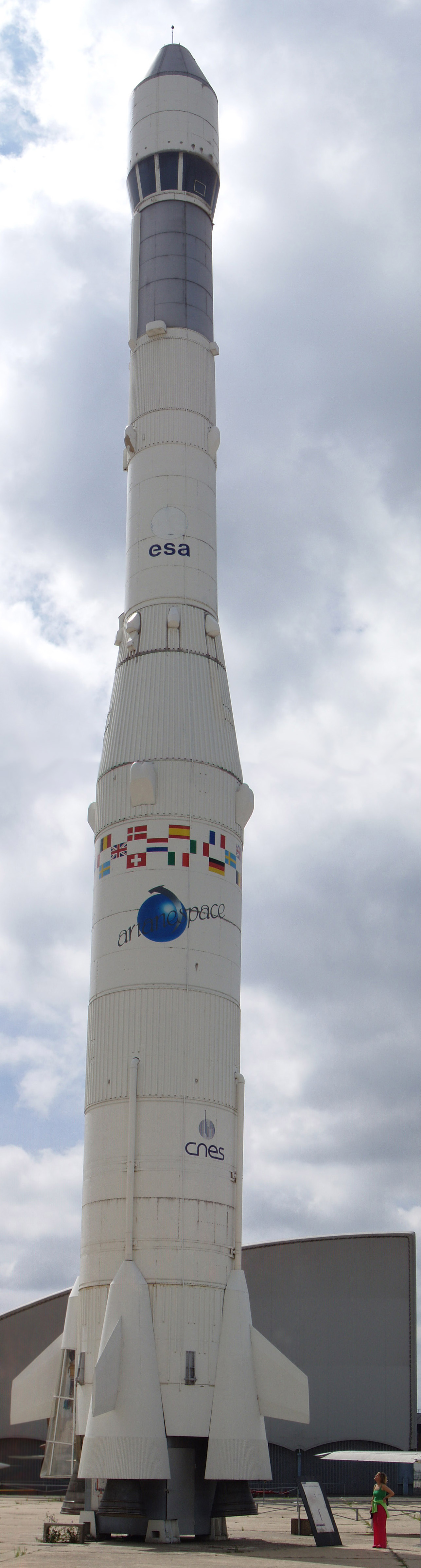 At Le Bourget museum of aviation.